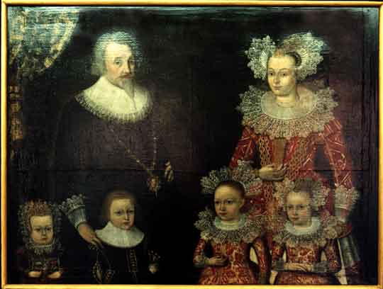 Familienporträt des Anton Köhler mit seiner ersten Ehefrau geb. Hebbens und Kindern (1633) in der Köhlerschen Ahnengalerie.